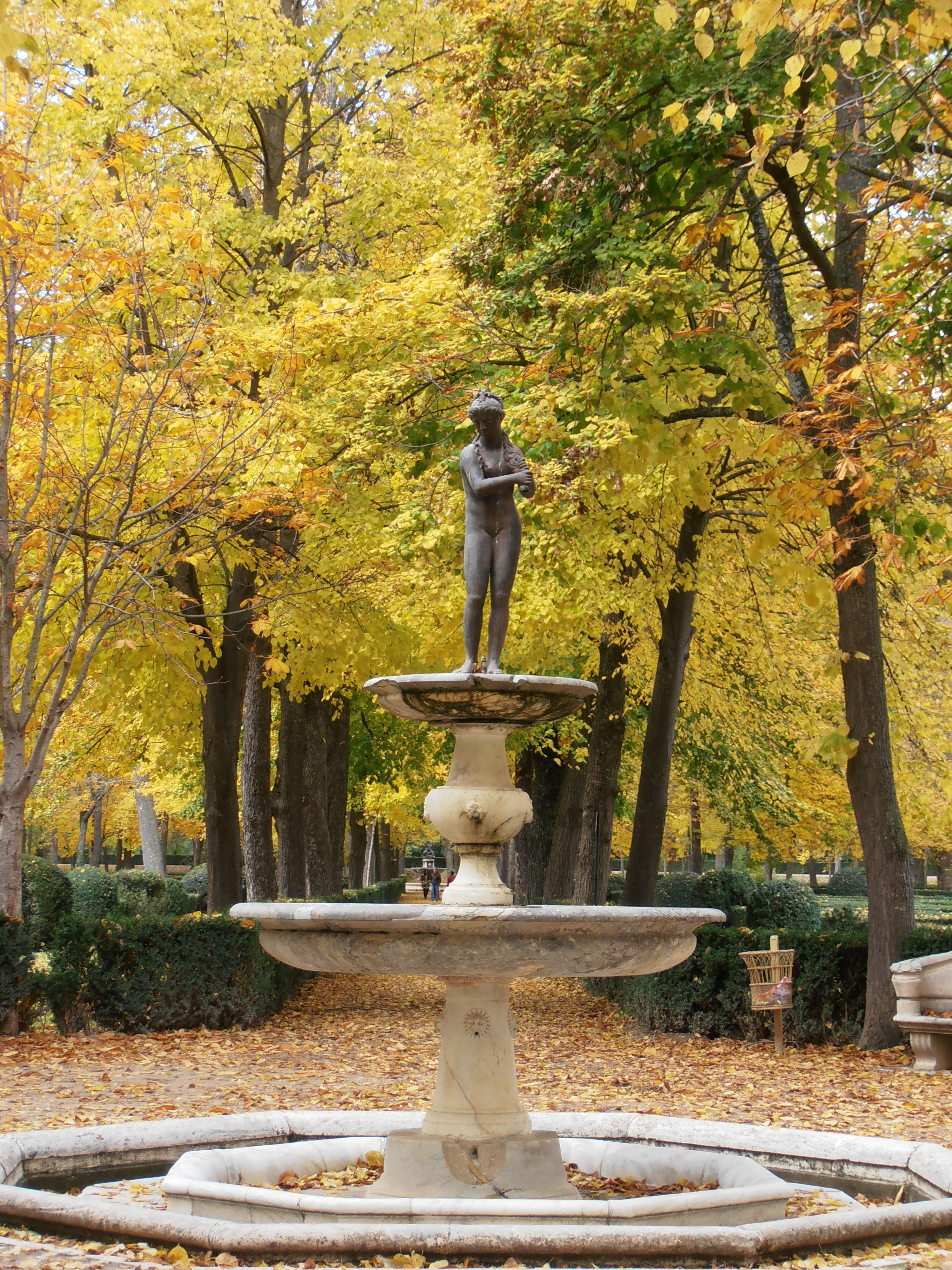 Jardín de la Isla